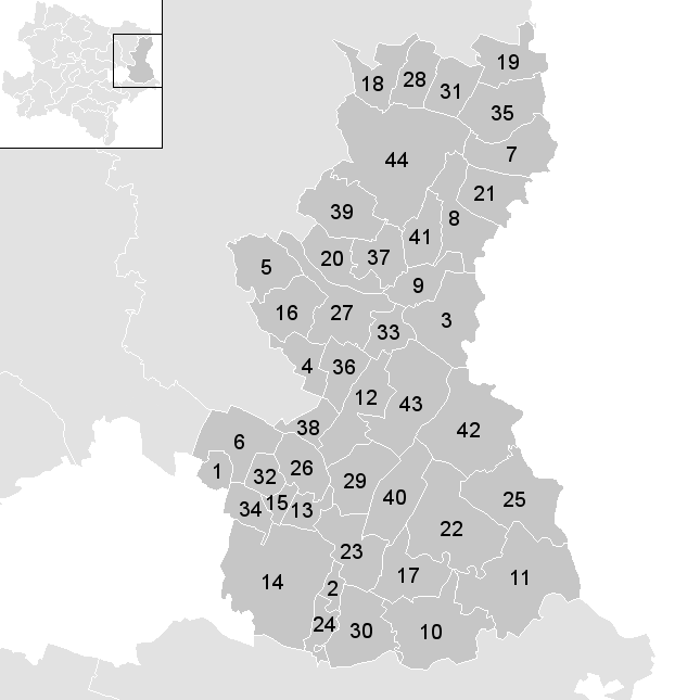 Leere Karte mit den Gemeinden im Österreichischen Bezirk Gänserndorf